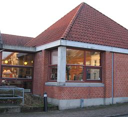 Silkeborg Arkivs nuværende residens.